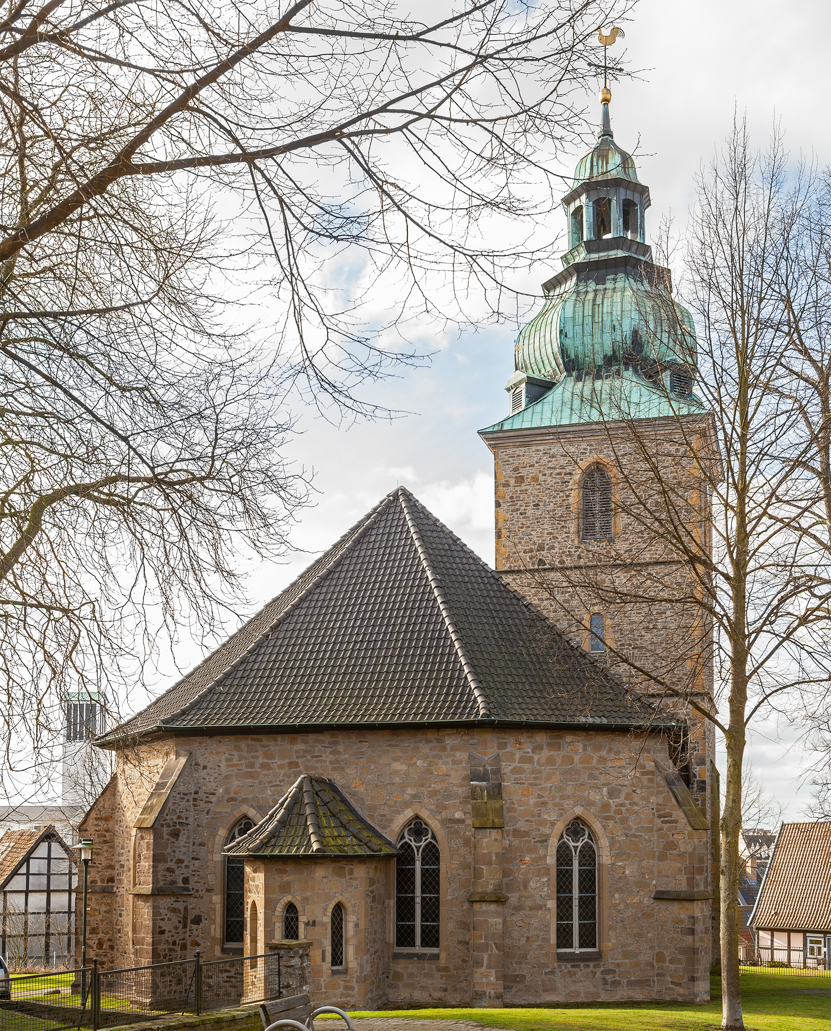 Stadtkirche in Bad Salzuflen, Brunnengasse 4 This is a photograph of an architectural monument.